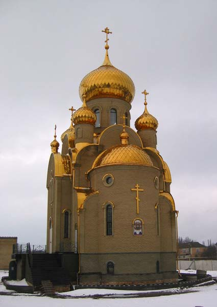 Харцызск.Иверский храм Харцызск